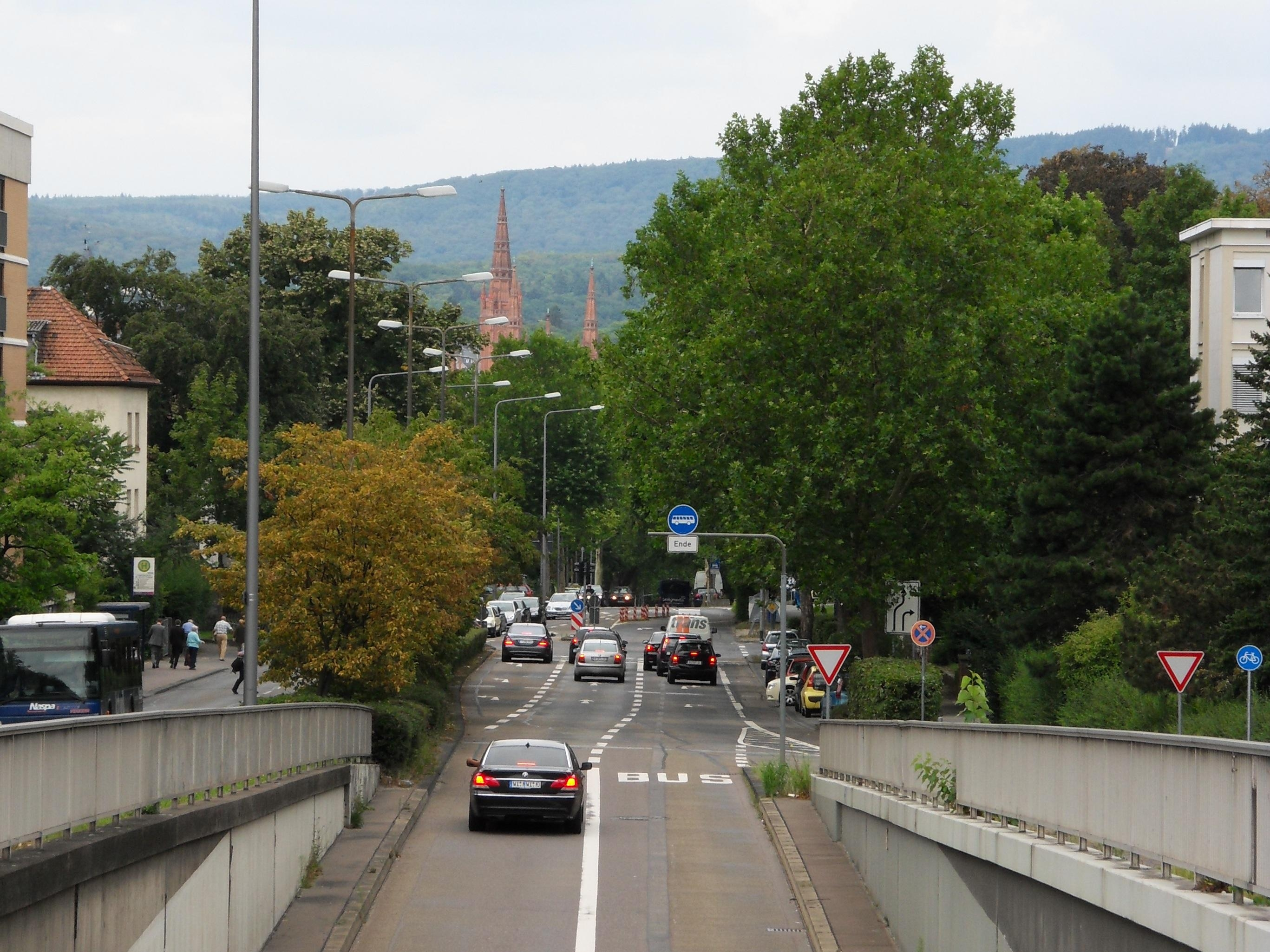 Frankfurter Straße in Wiesbaden, Blick von Südosten; im Hintergrund die Türme der Marktkirche